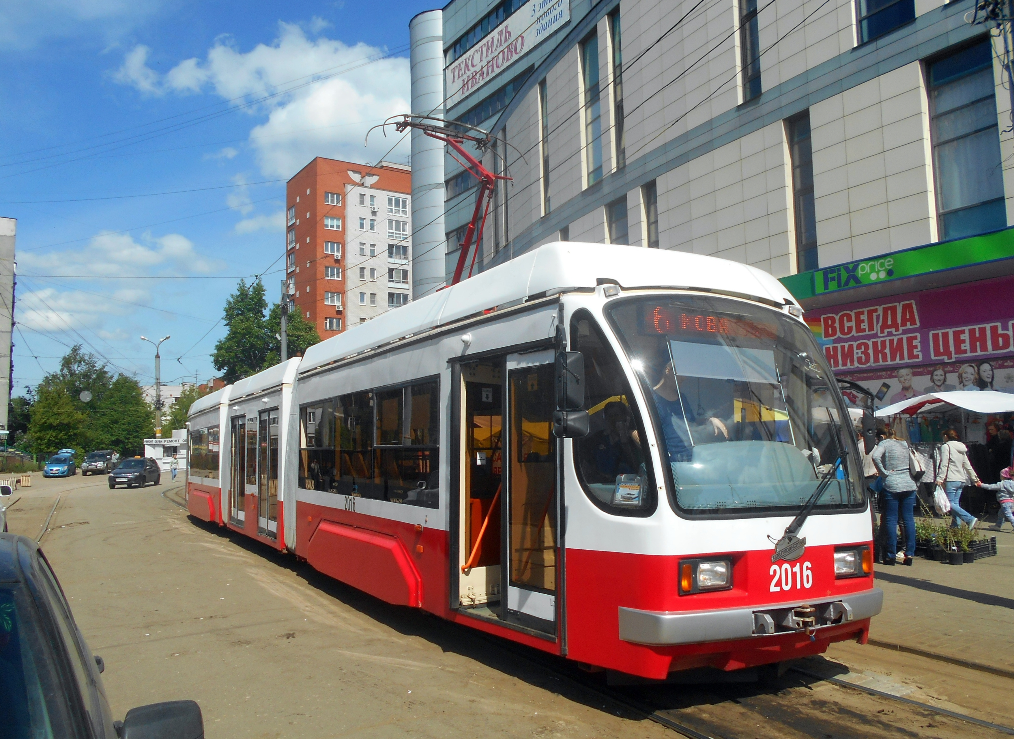 Трамвайный вагон 71-409 № 2016 на остановке "Московский вокзал" в Нижнем Новгороде